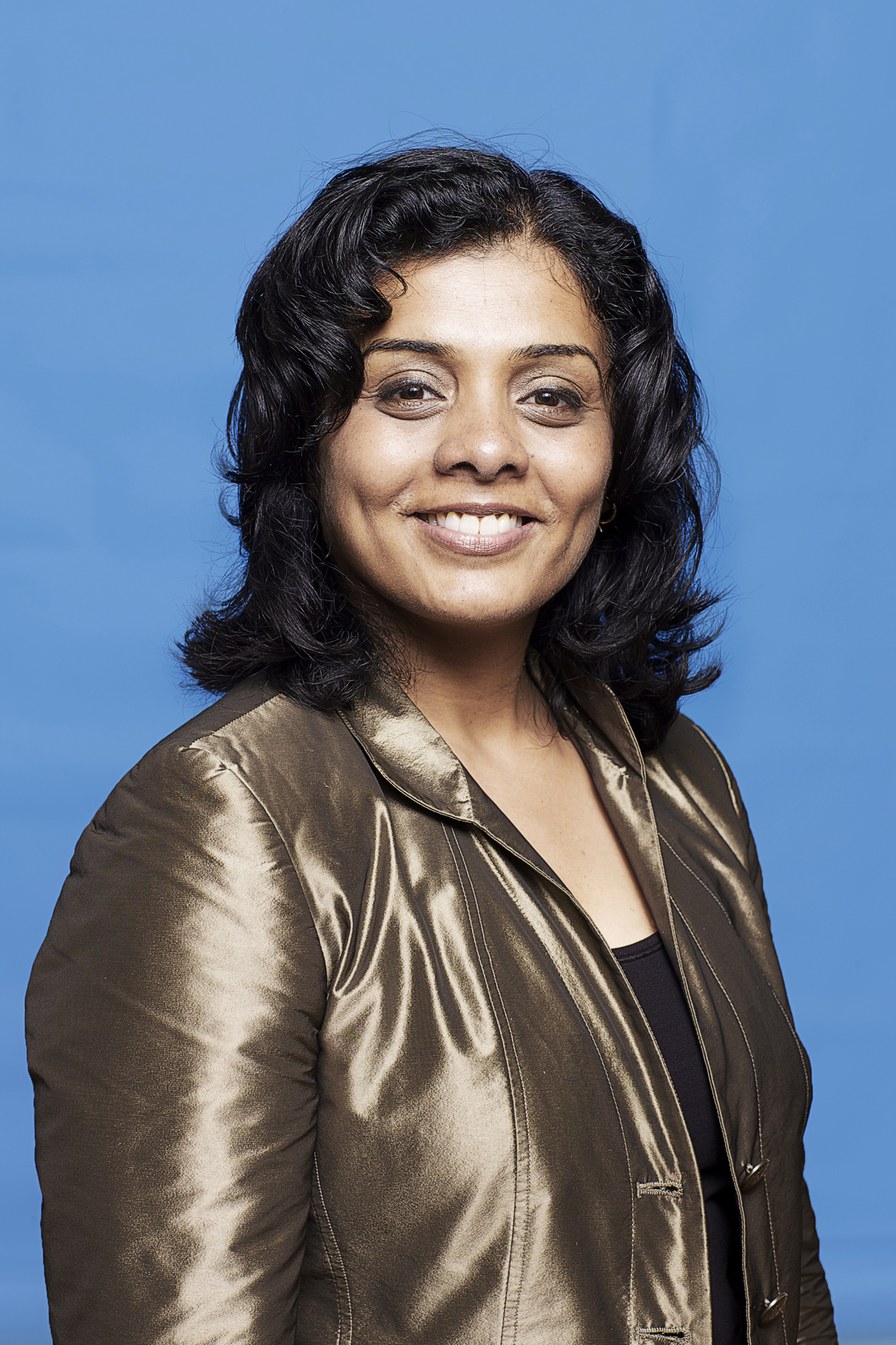 Tanja Jadnanansing, Tweede Kamerlid. Foto: Lex Draijer.